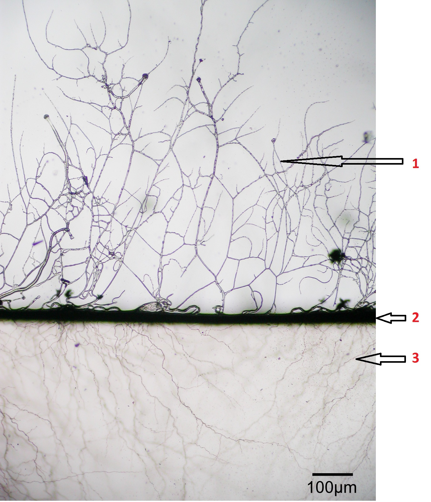 Gambar merupakan A. niger. Penjelasan gambar: 1.hifa reproduktif 2.permukaan substrat 3.hifa vegetatif